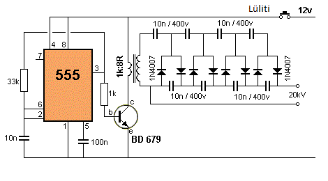 Elektrishokirelva näidisskeem